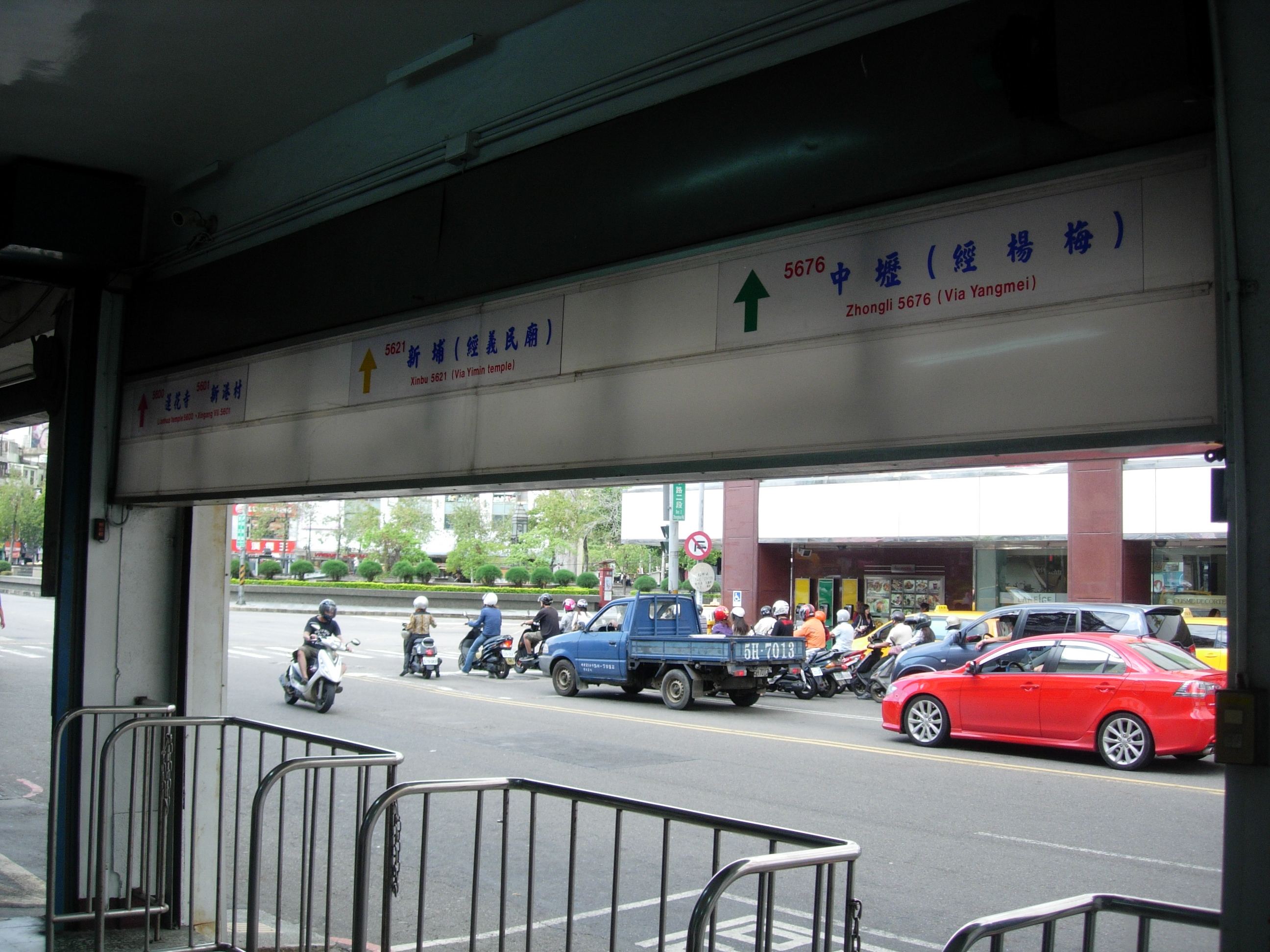 中文（台灣）: 新竹客運新竹北站月台